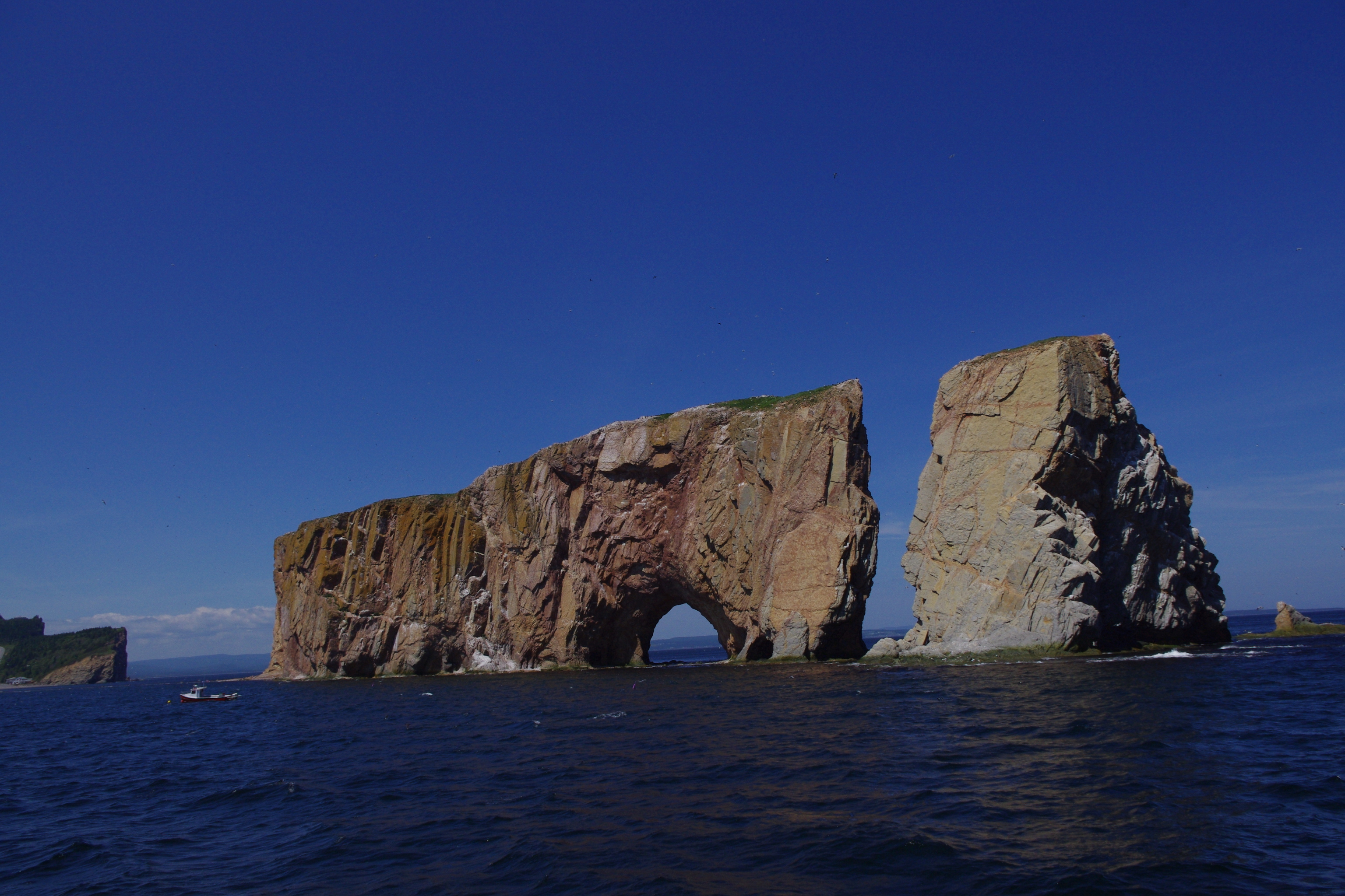 加拿大魁北克加斯佩地区Le Rocher-Percé